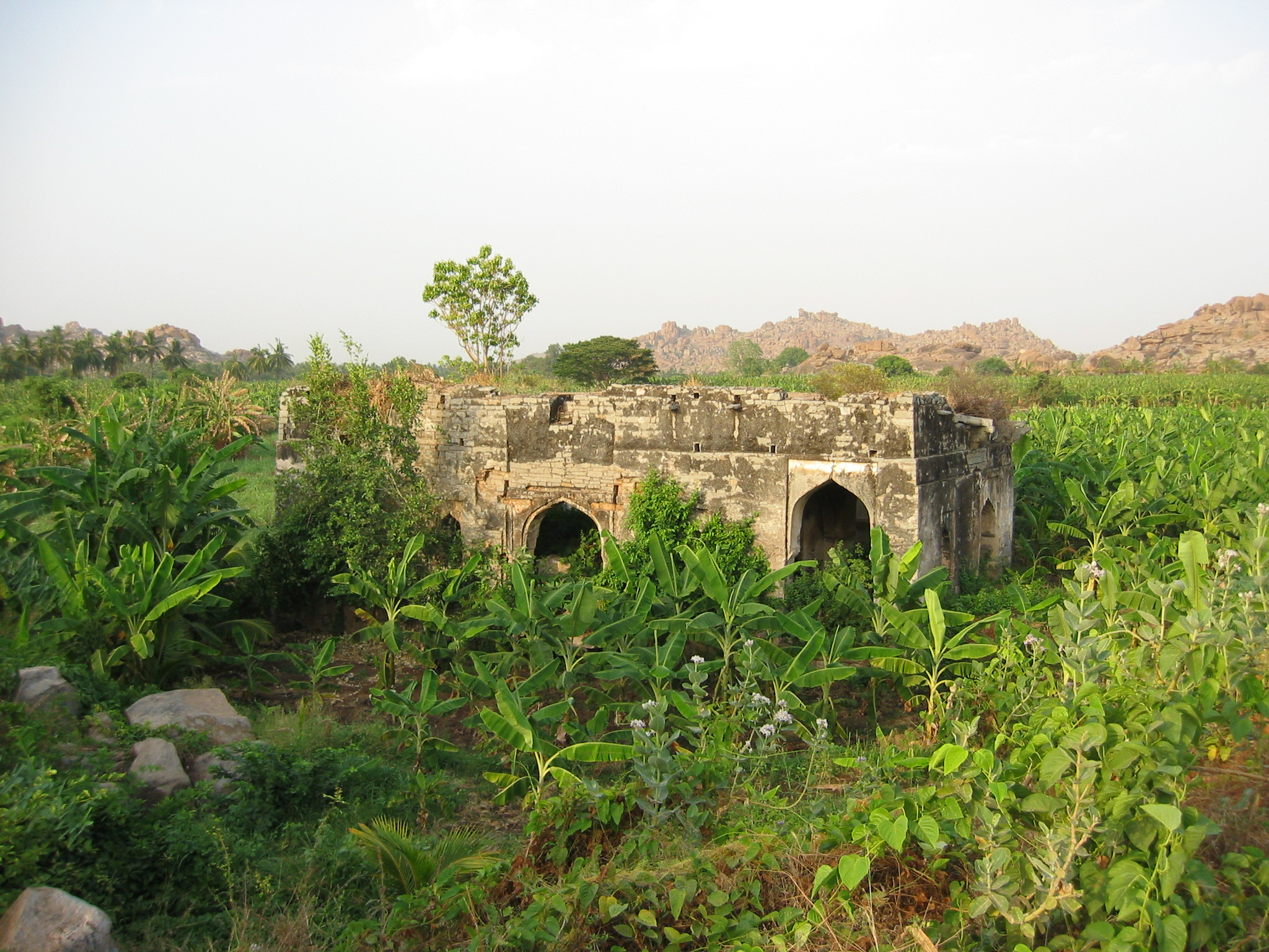 Ruine in einer Bananenplantage (Hampi, Karnataka, Indien)